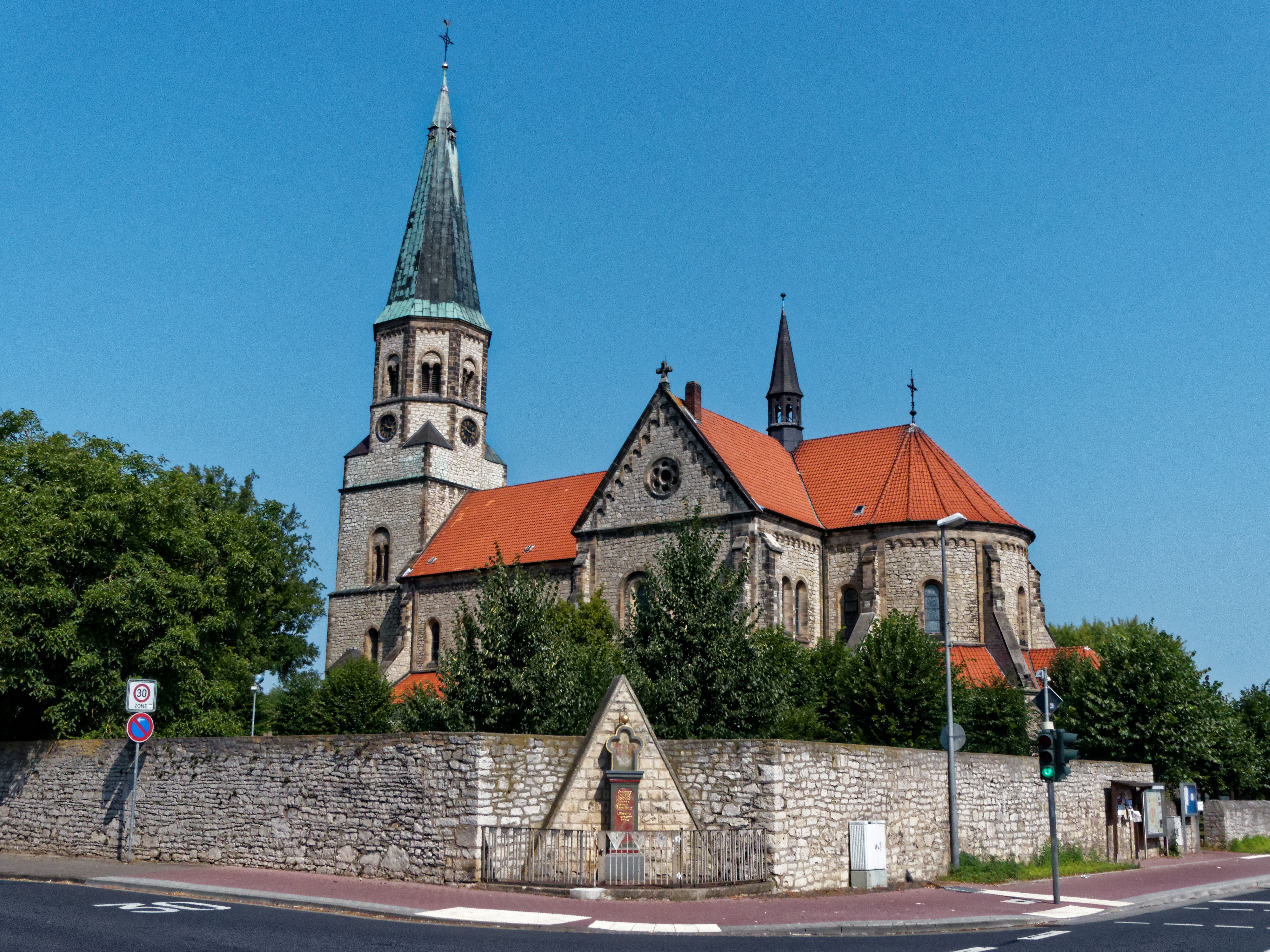 Blick von Südosten auf die kath. Pfarrkirche St. Cäcilia in Harsum